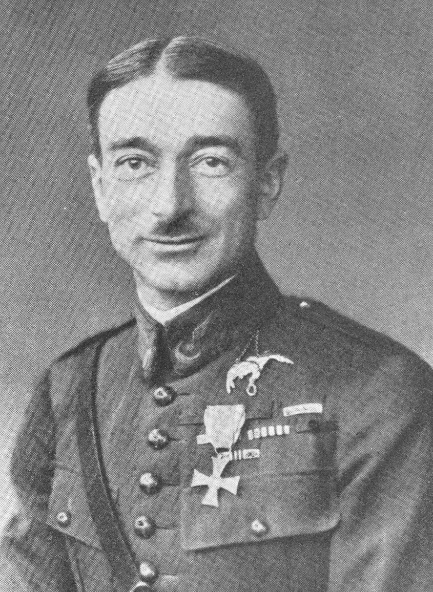 Major pilot Robert de Chivre.